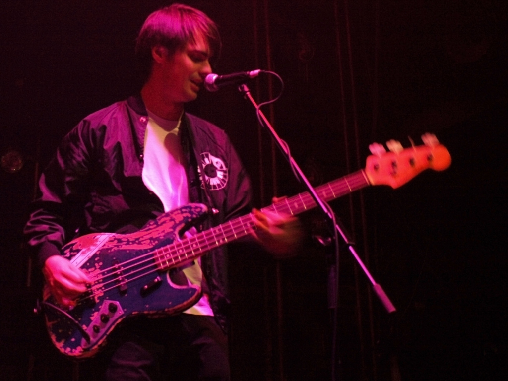 Sam Farrar - Phantom Planet